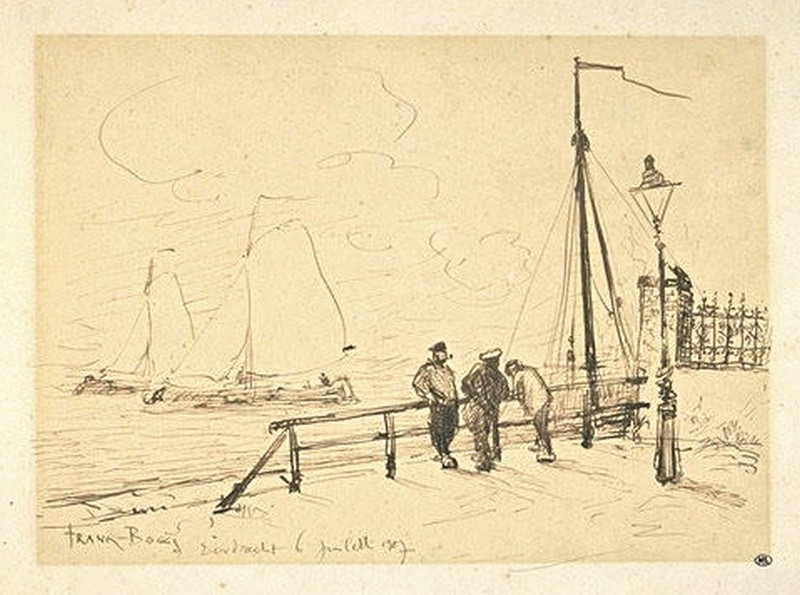 Marins à Dordrecht par le peintre américain Frank Myers Boggs (1855-1926). Dessin : encre brune à la plume, (24,4x31,6). Signée en bas à gauche et datée 6 juillet 1907. propriété de l'Etat ; donation ; Musée du Louvre département des Arts graphiques en 1974. Conservation : Paris ; musée du Louvre département des Arts graphiques.